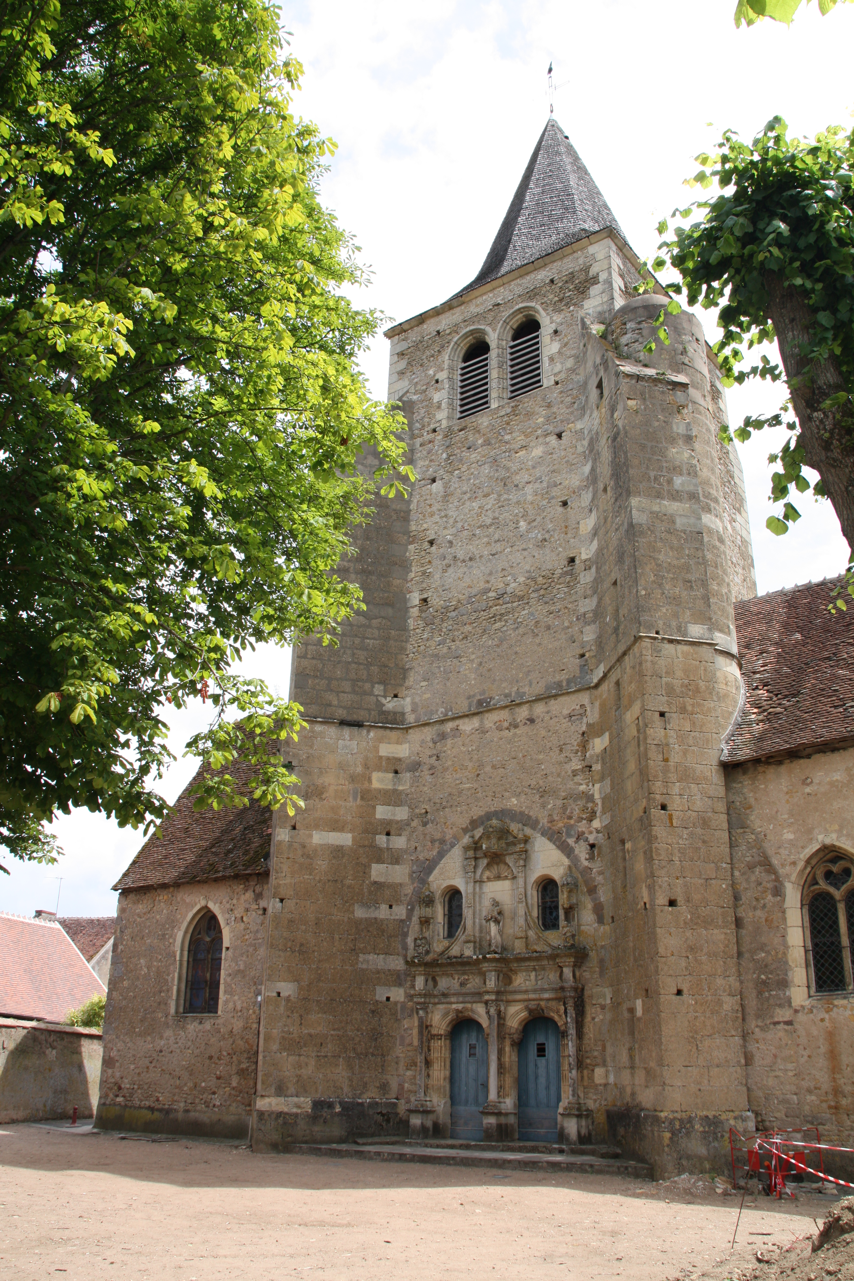 Église Saint-Étienne à Ainay-le-Château, France.